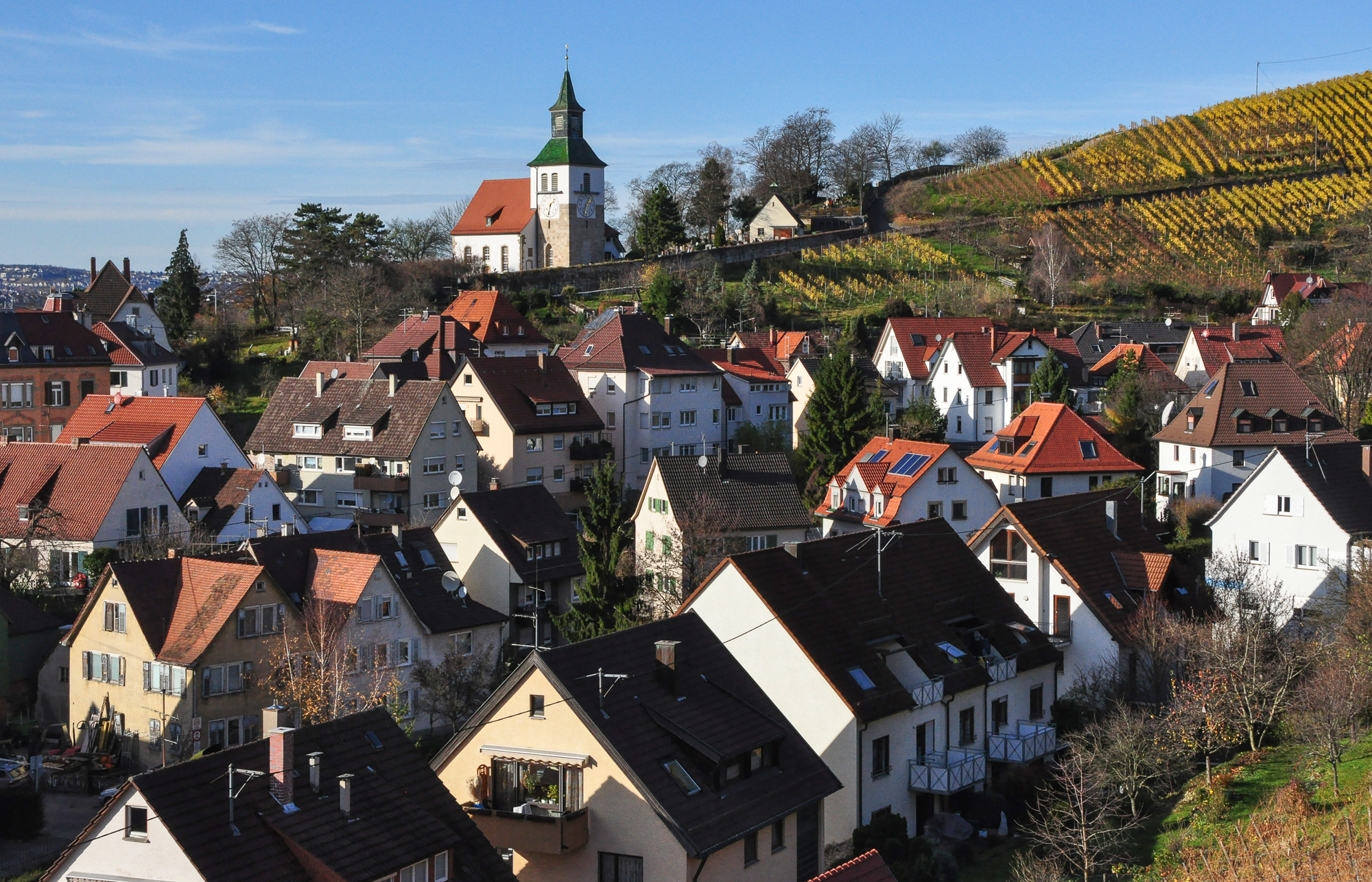 Kulturdenkmal §2